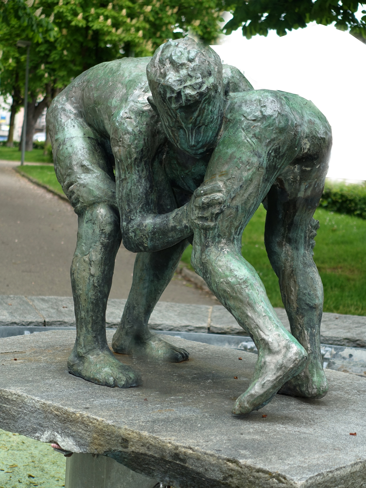 Brunnen Skulptur, Zwei Ringende Knaben, von Urban Blank (1924) Bildhauer, Allee Schulhaus, Wil, St.Gallen